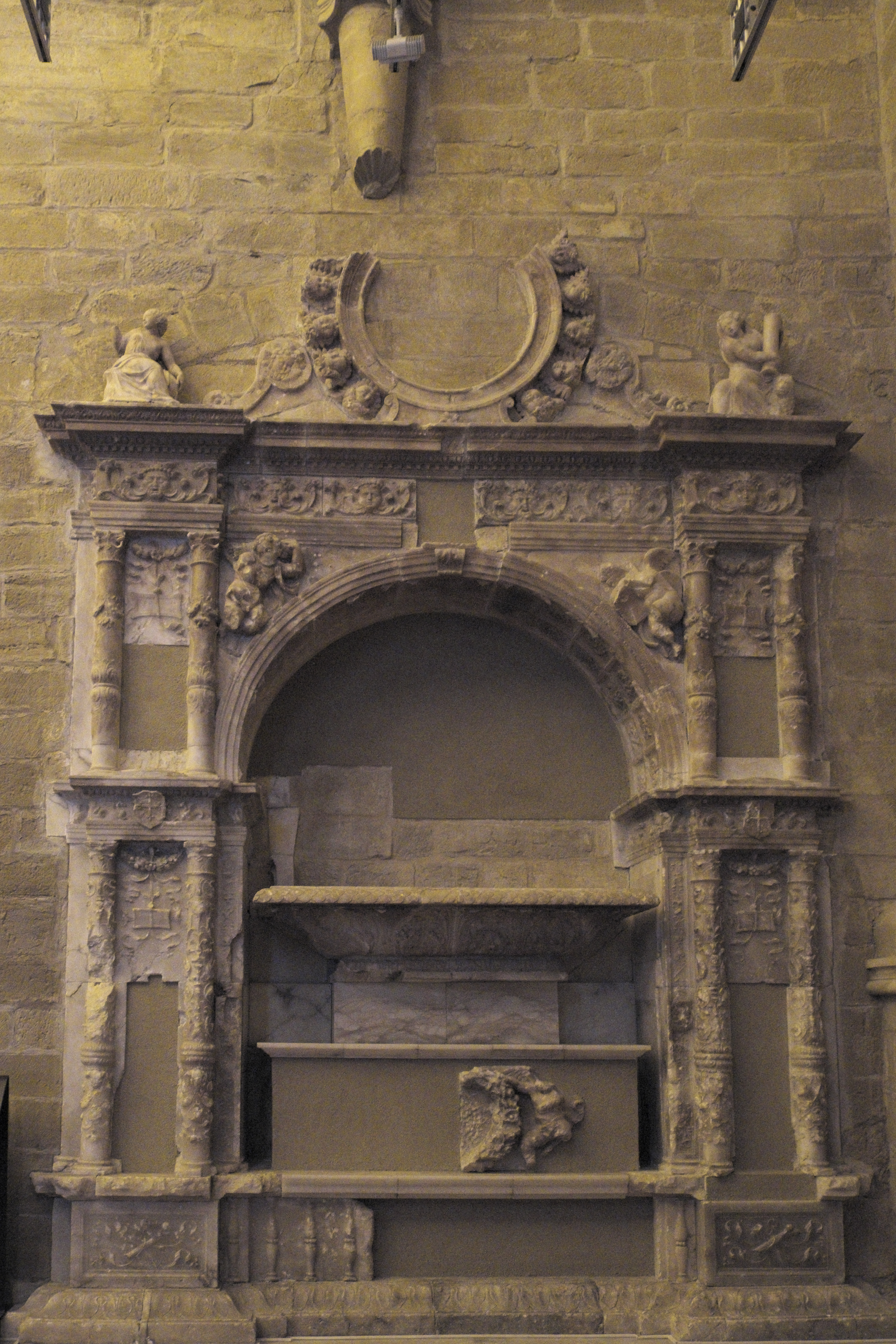 Castillo-Convento von Alcañiz in der Provinz Teruel (Aragonien/Spanien), Grabmal von Juan de Lanuza